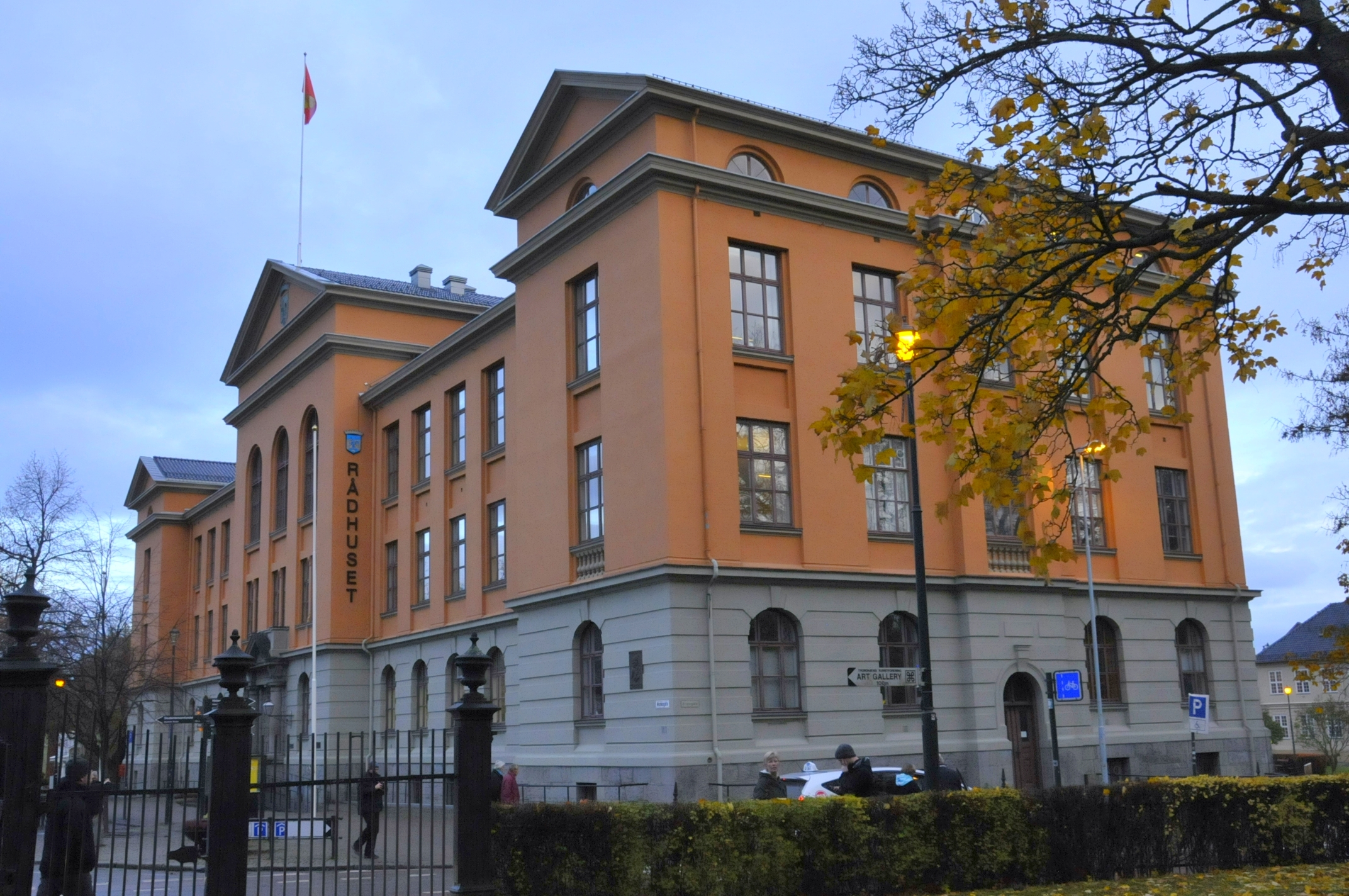 Radhaus Trondheim